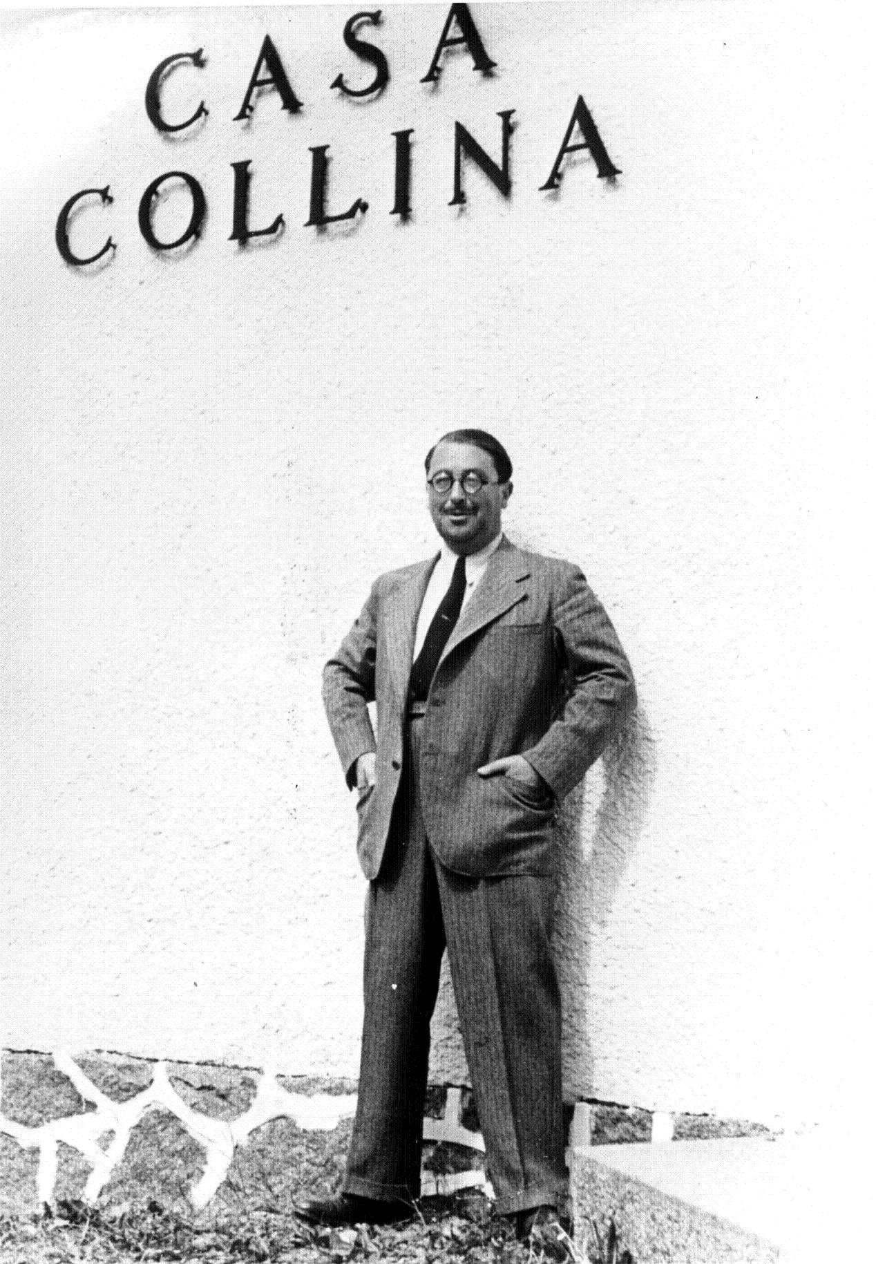 Frank Heller (Gunnar Serner) framför Casa Collina